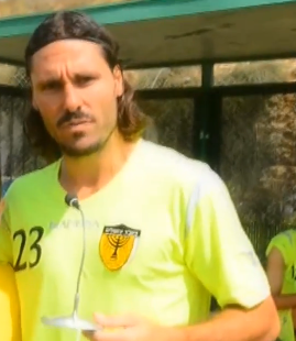 דריו פרננדס במדי בית"ר ירושלים